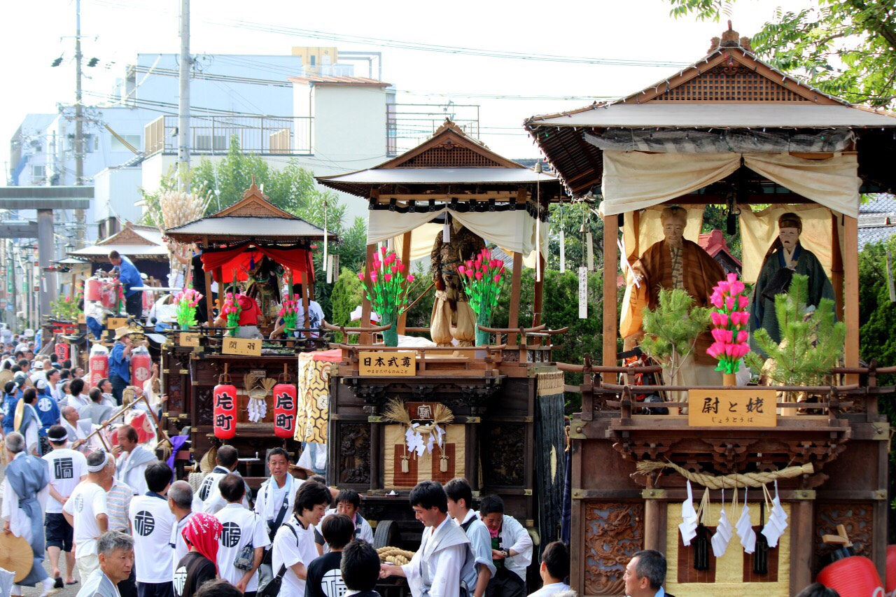 田辺祭(2018)